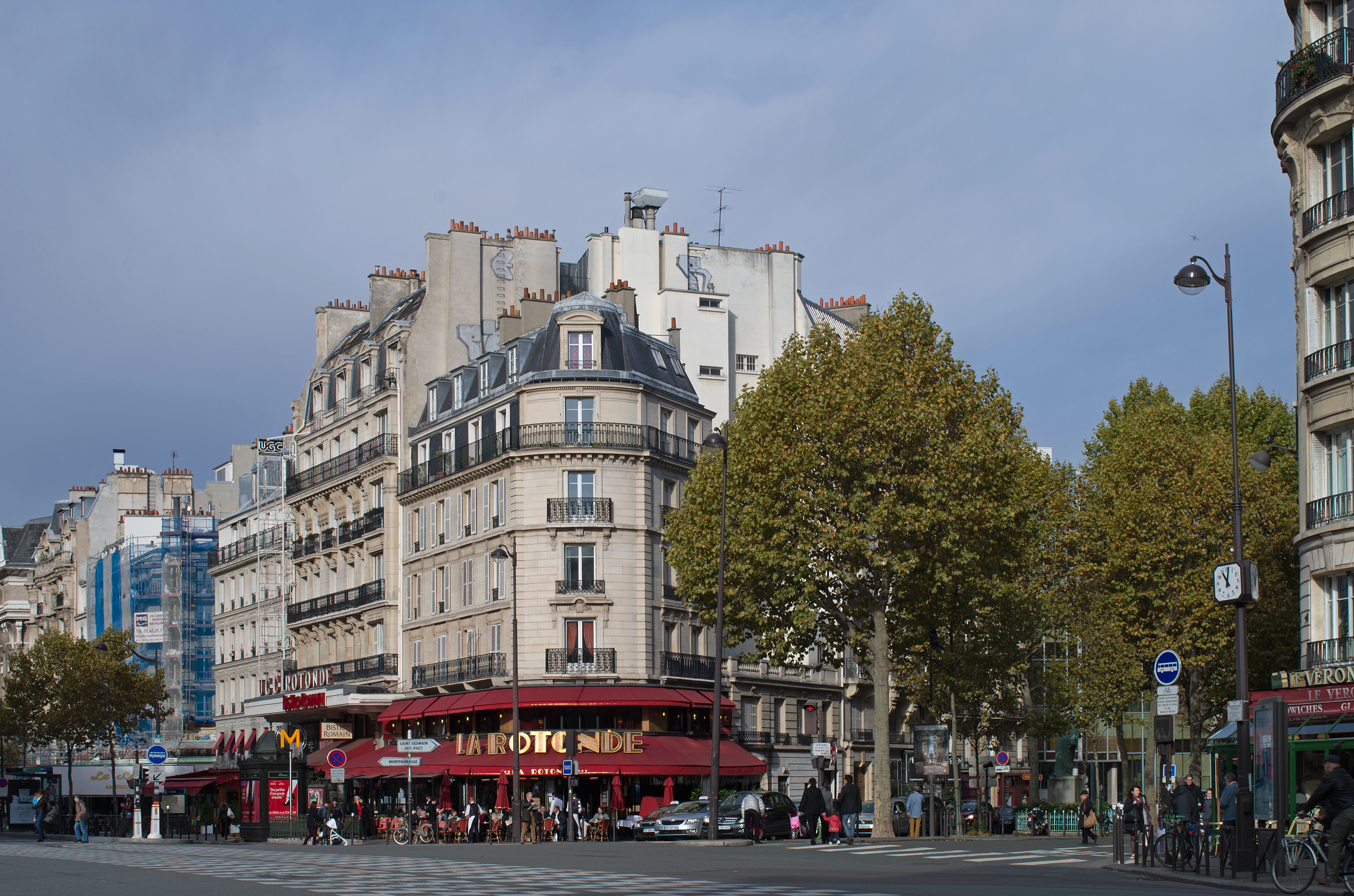 Métro Vavin à Paris - Croisement du Boulevard du Montparnasse et du Boulevard Raspail dans le 6ème arrondissement.